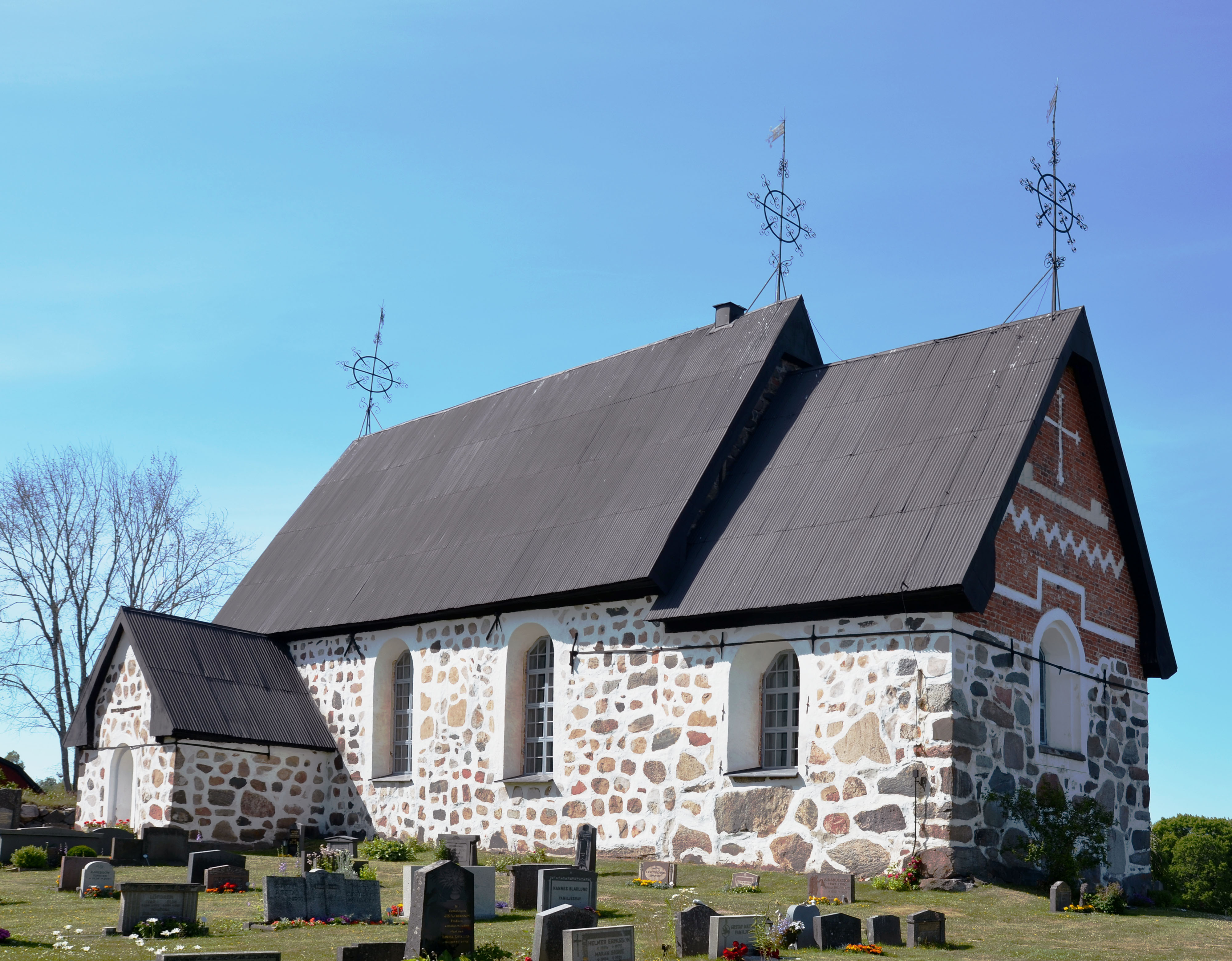 Edsbro kyrka - vy från sydväst